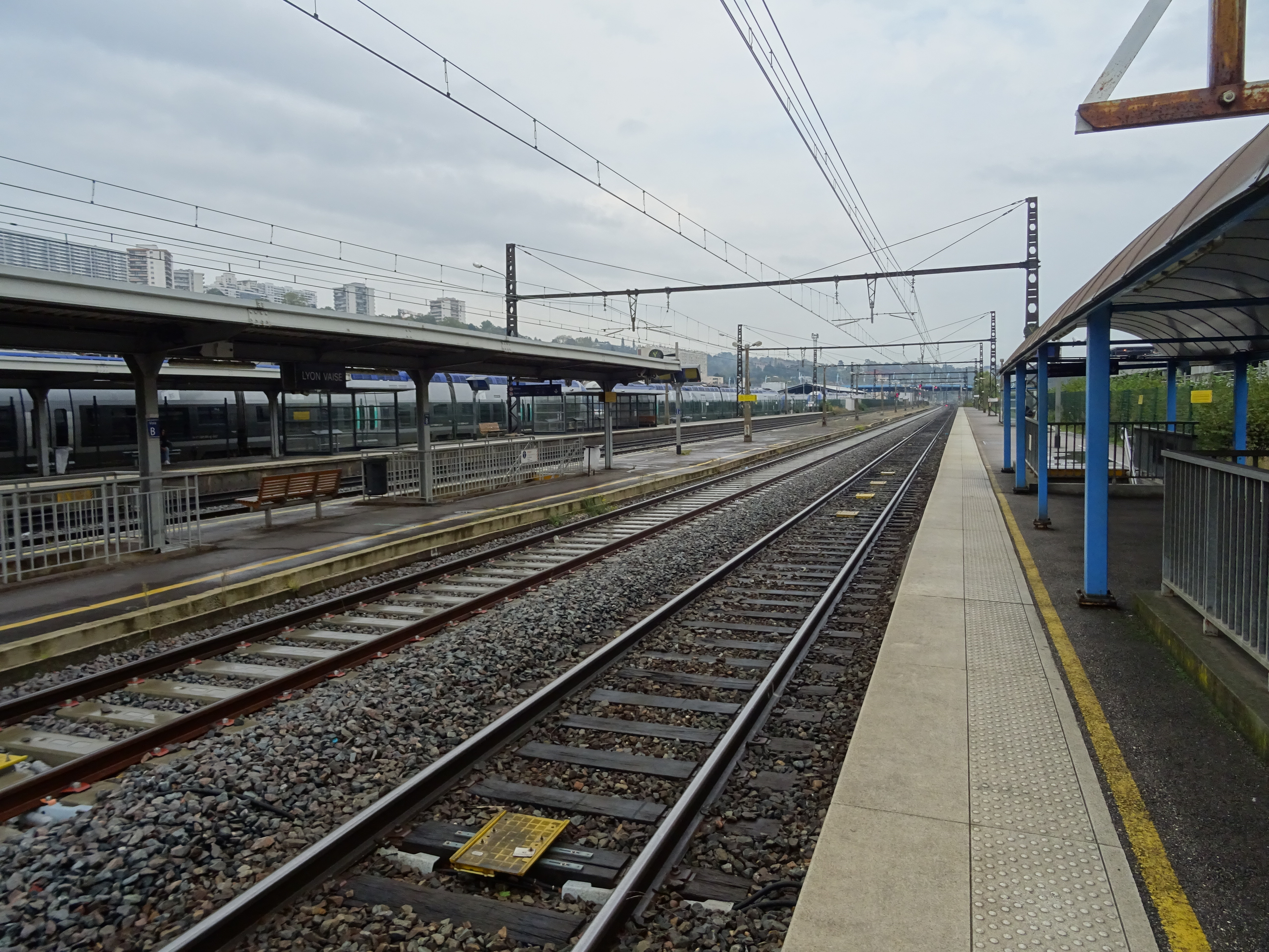 Quais et voies en gare de Lyon-Vaise.